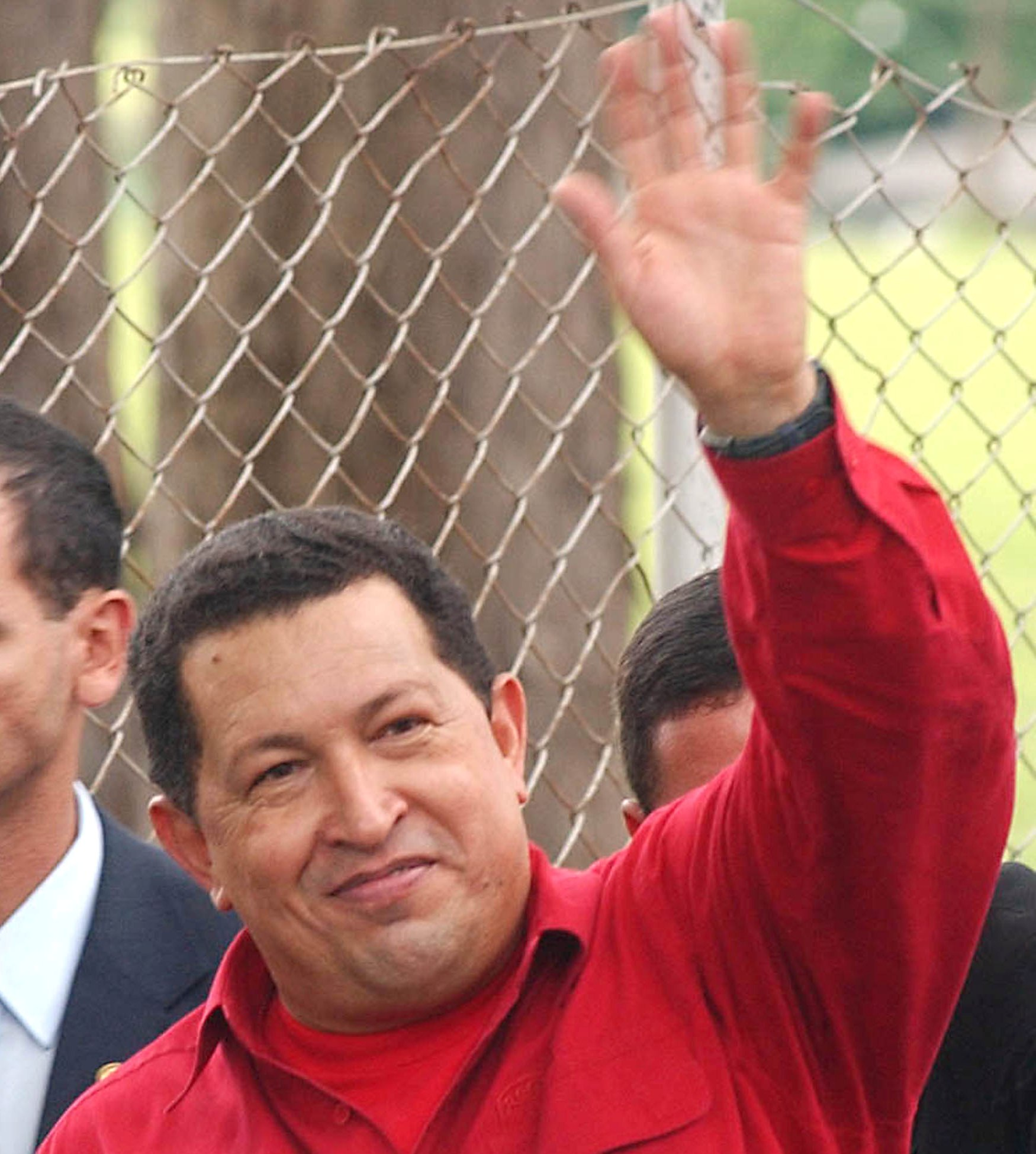 Brasília - Entrevista do presidente da Venezuela, Hugo Chávez, após reunião na Granja do Torto com os presidentes do Brasil, Luiz Inácio Lula da Silva, e da Argentina, Néstor Kirchner. (Foto José Cruz/ABr)